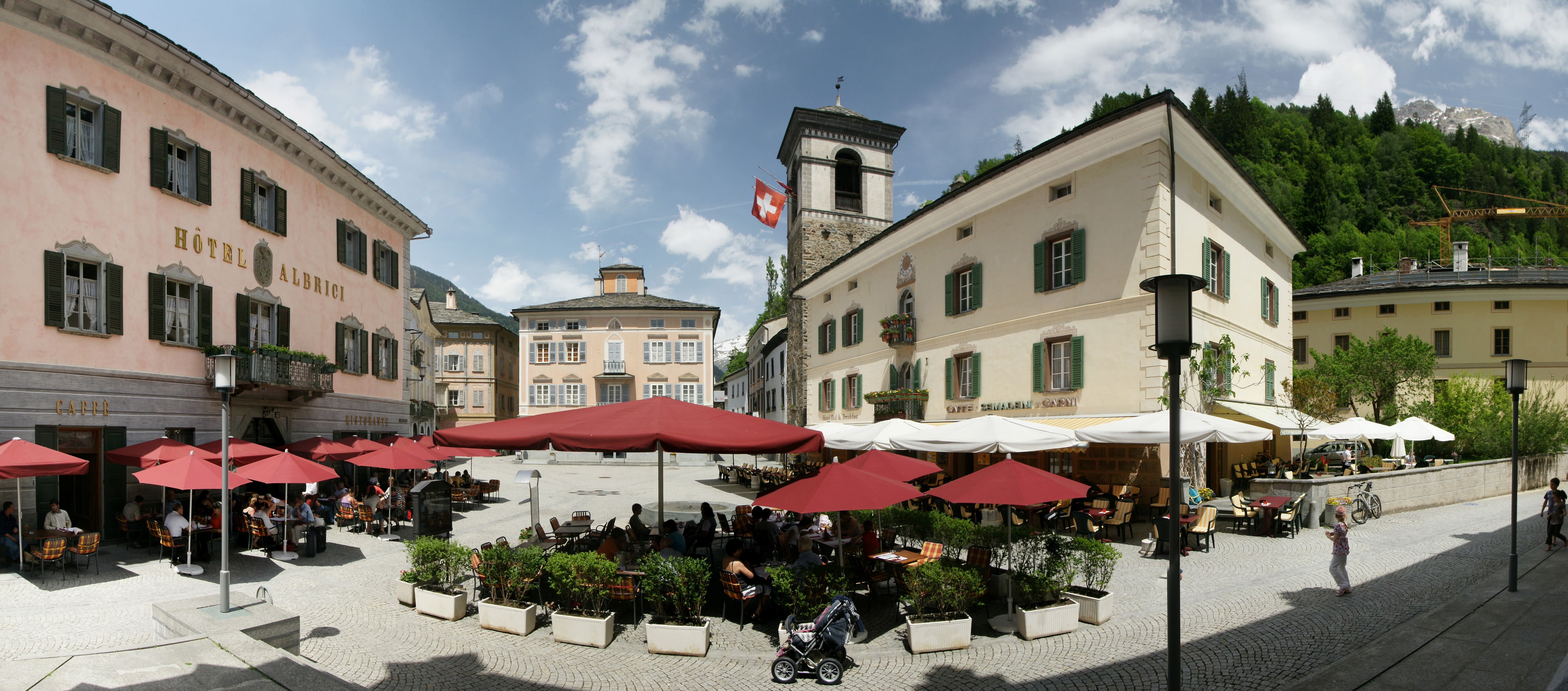 Piazza di Communale. Poschiavo (deutsch/rätoromanisch Puschlav) ist eine politische Gemeinde im südlichen Graubünden (Schweiz). Zusammen mit der Nachbargemeinde Brusio bildet Poschiavo die Talschaft Valposchiavo (deutsch: Puschlav) und den Bezirk Bernina.